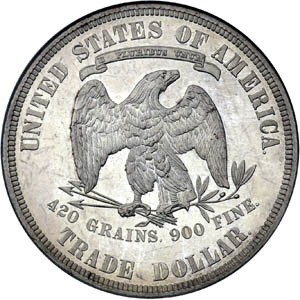 1884 Trade Dollar Reverse